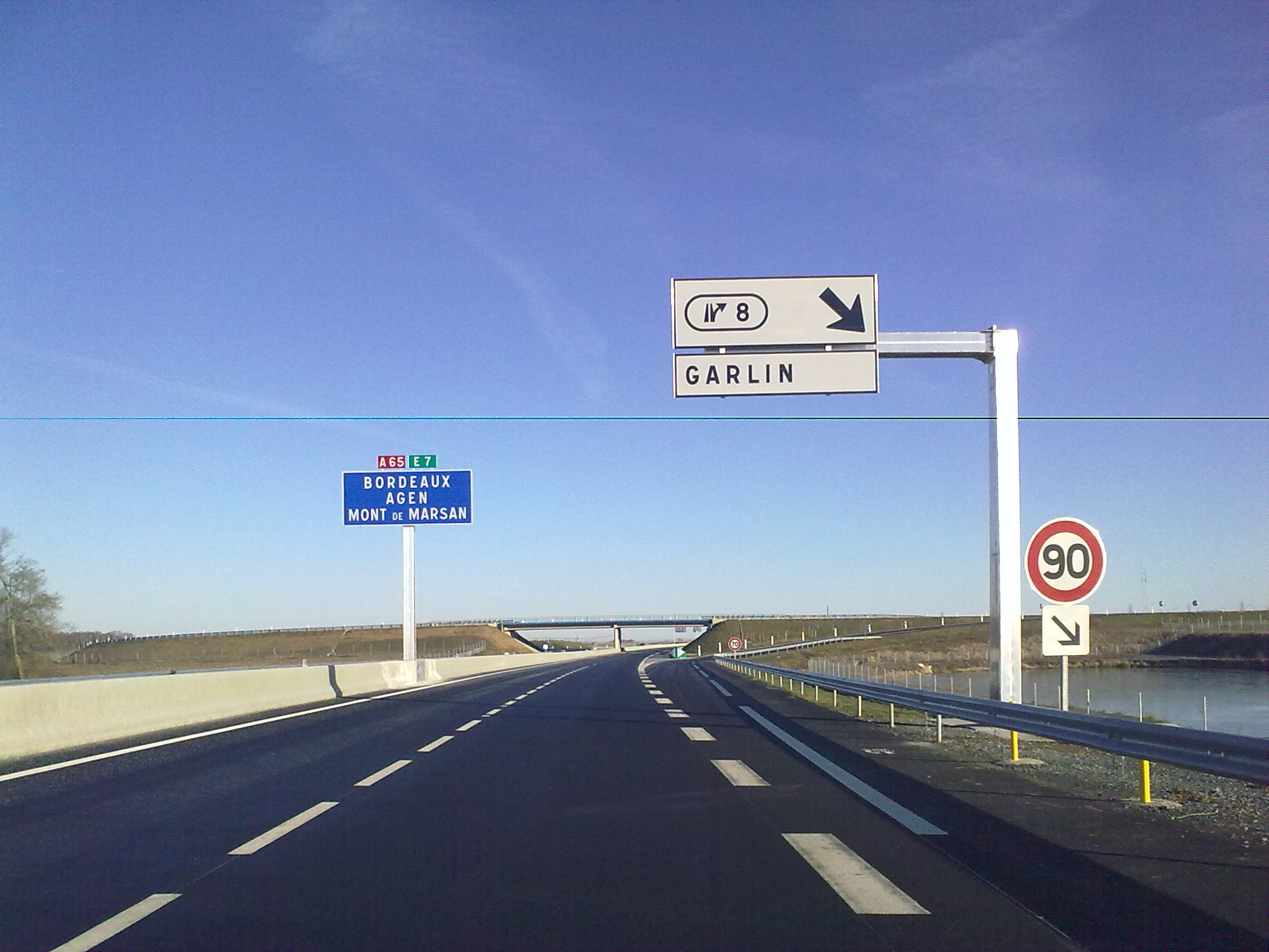 Autoroute française A65 en service, photo prise le dimanche 19 décembre 2010 (3 jours après la mise en service).